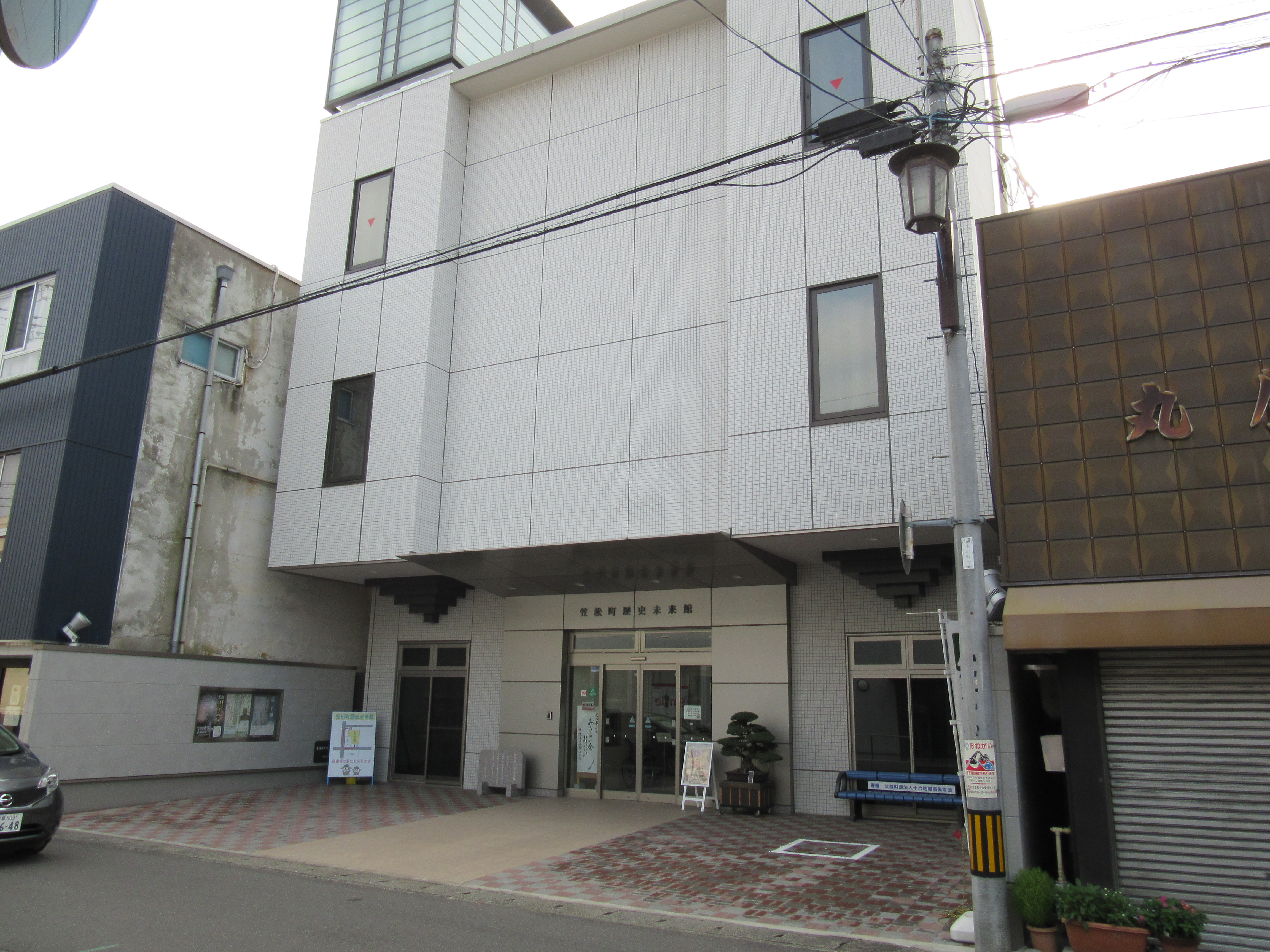 笠松町歴史未来館